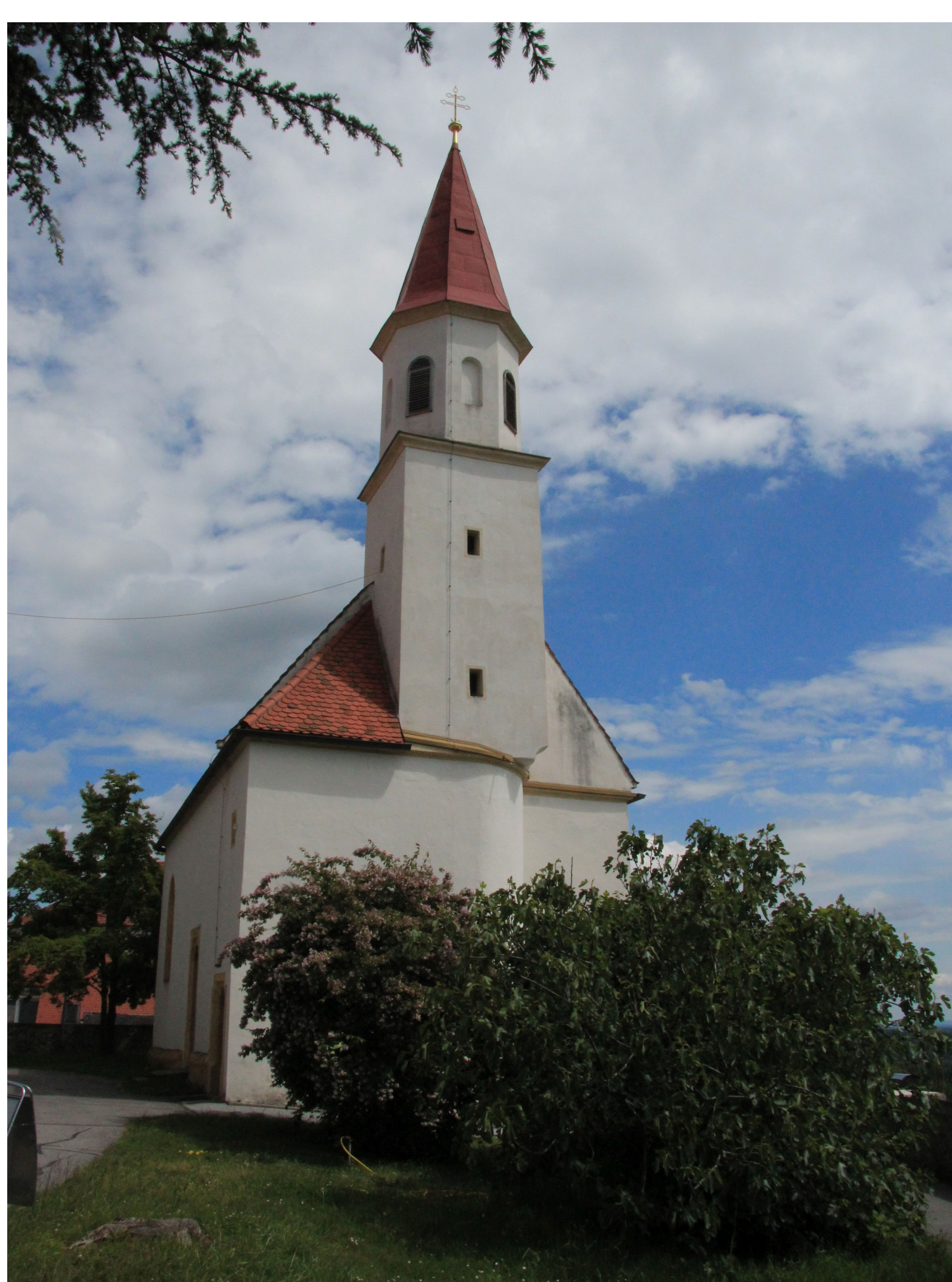 Doppelkirche Sankt Sebastian in Straden, Südoststeiermark